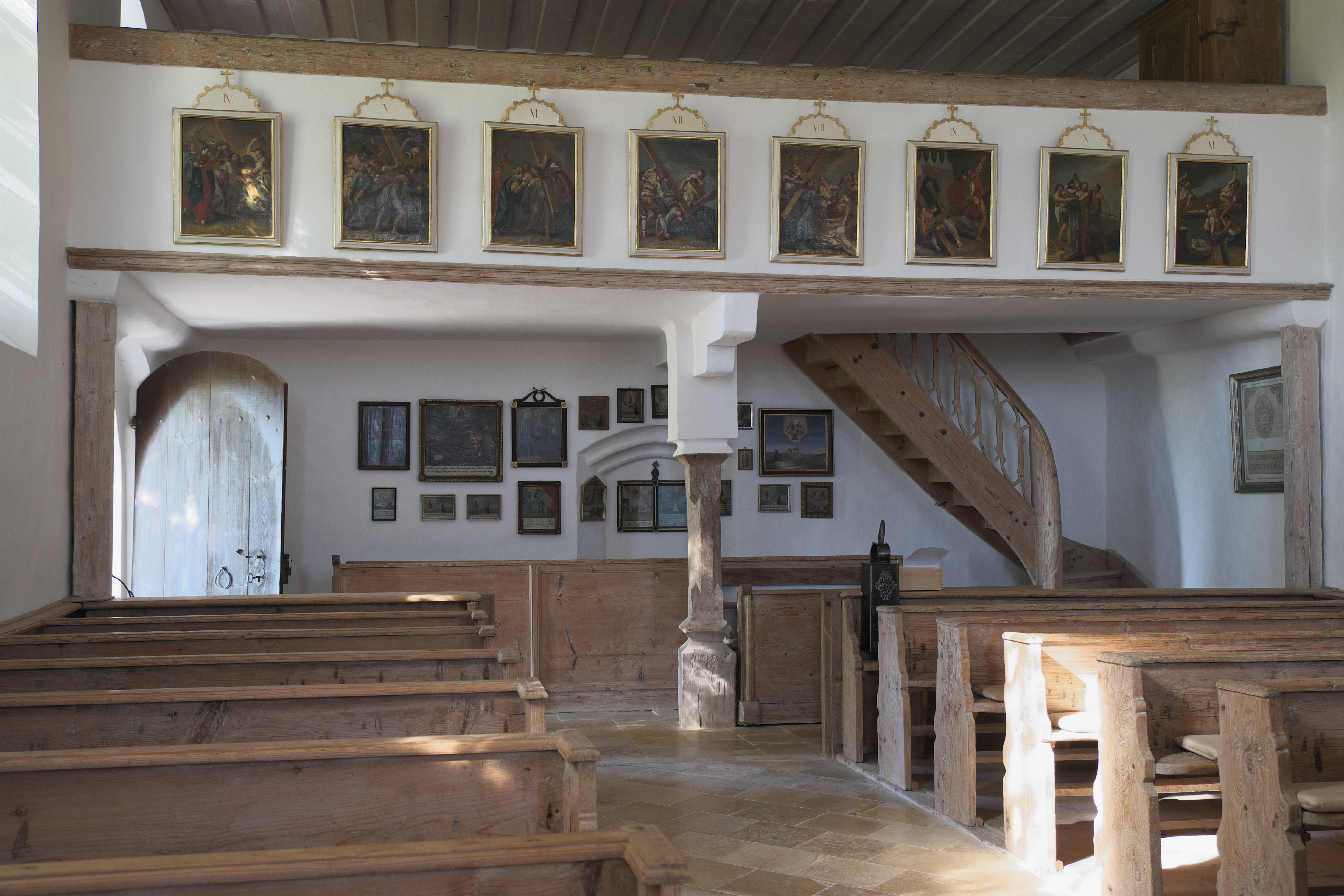 Katholische Filialkirche St. Maria (Maria Himmelfahrt) in Bergkirchen (Jesenwang) im Landkreis Fürstenfeldbruck (Bayern/Deutschland), Innenraum